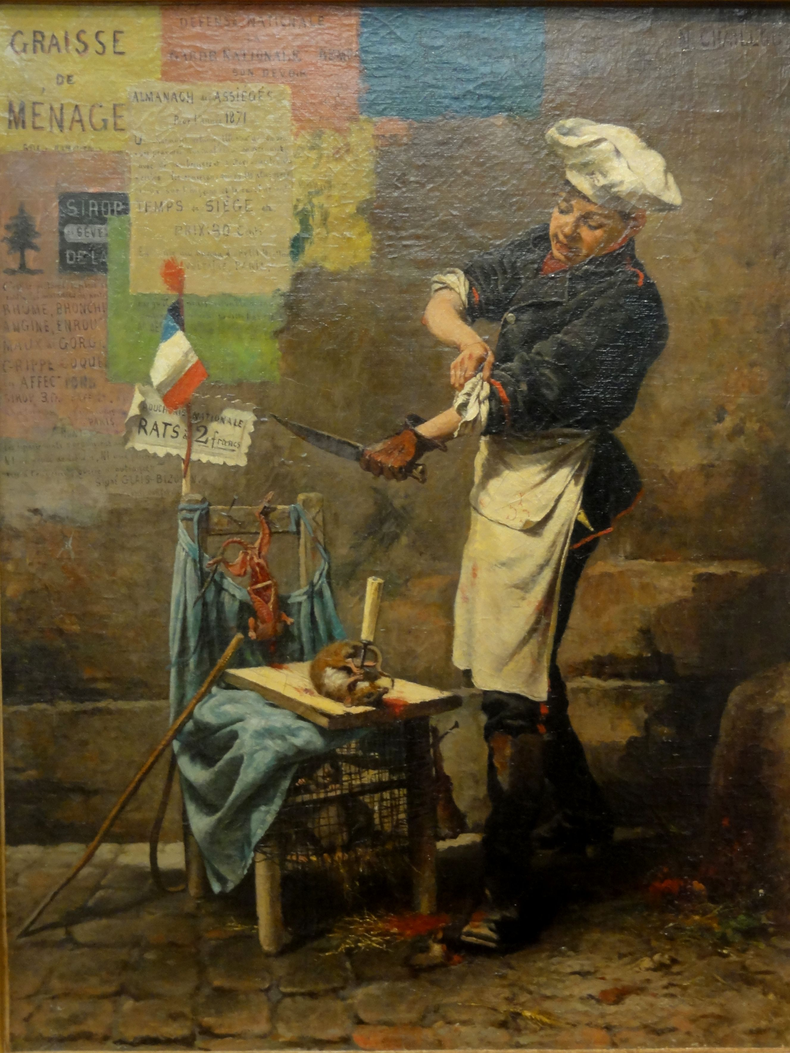 Narcisse Chaillou (1837-ap. 1896), Le dépeceur de Rats, fin XIXe s., inv. 92.01.01.